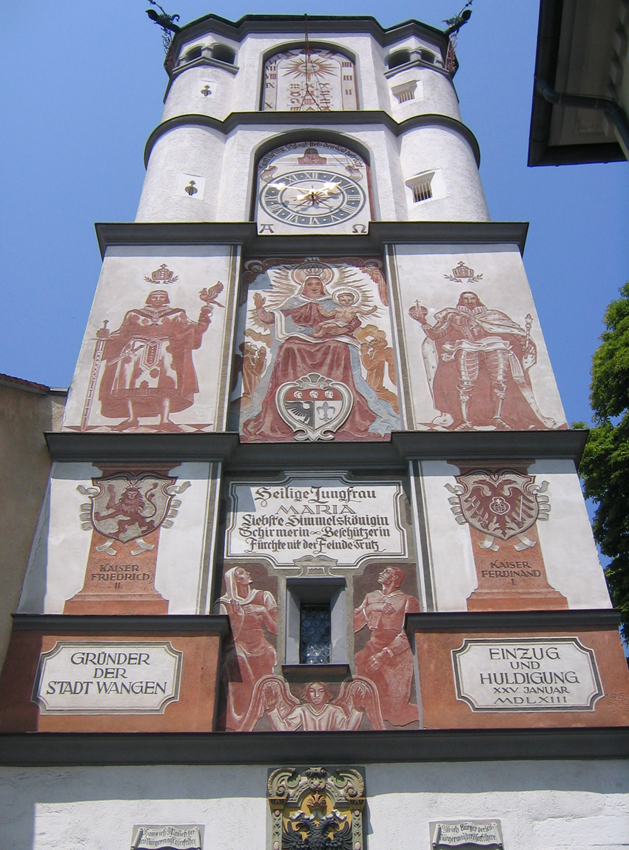 Wangen im Allgäu, Frauentor (Ravensburger Tor), Bemalung 1950 von Toni Schönecker (nach alten Vorlagen) erneuert